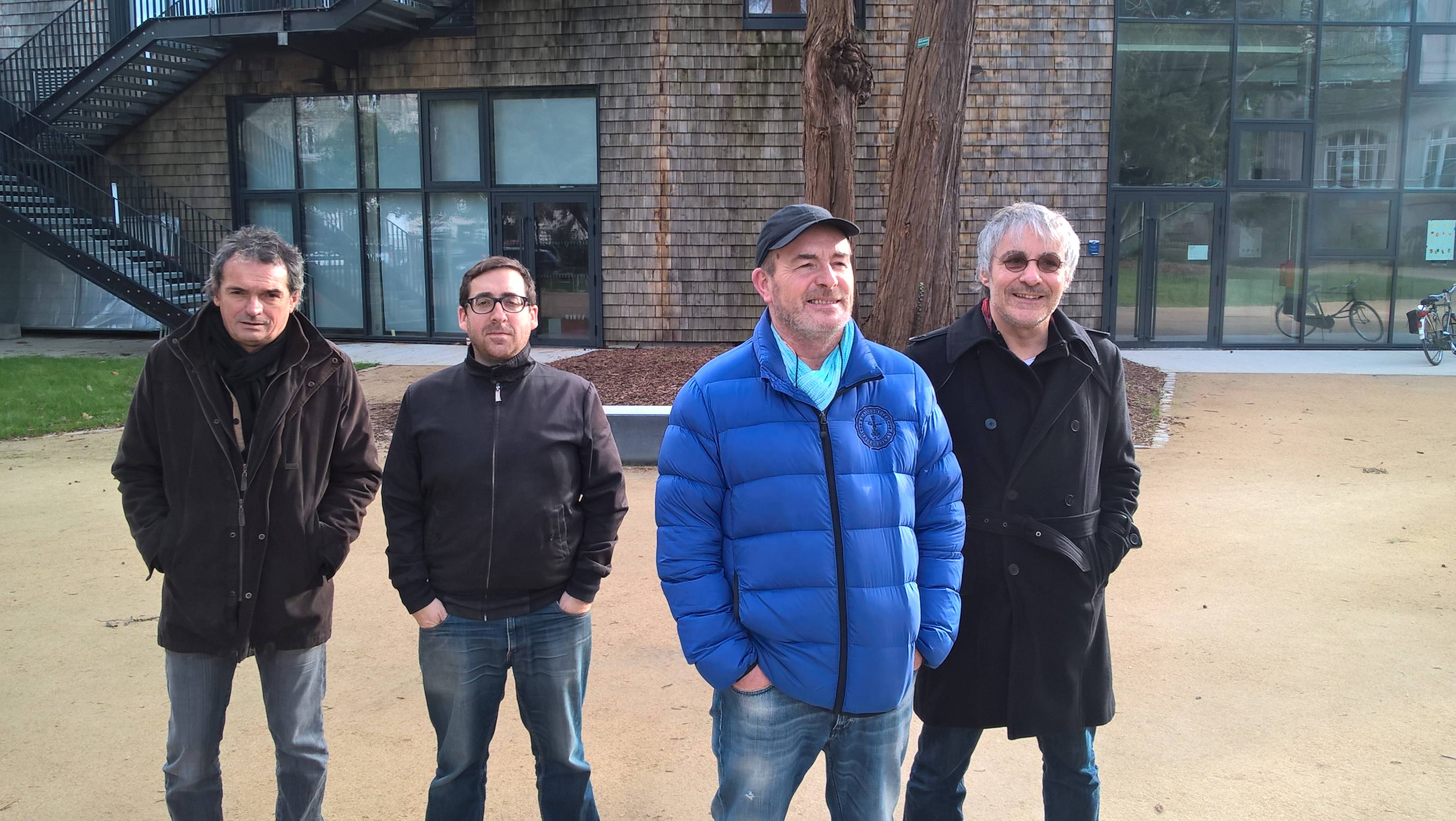 Red Cardell devant le Novomax à Quimper